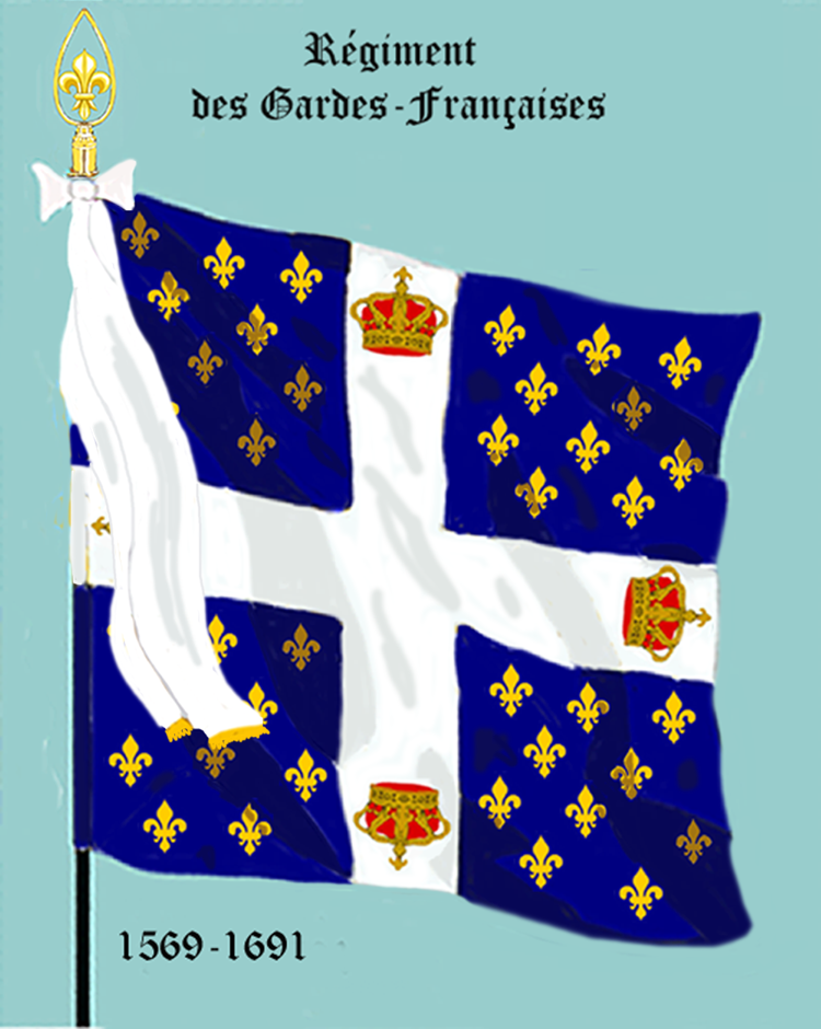 Ordonnanzfahne eines königlich französischen Infanterie-Regiments “Gardes-Françaises” von 1569-1691. - Entnommen und LES DRAPEAUX DE L'ARMÉE DU ROI“ Marseille 1899. (Drapeau d'ordonnance d' un régiment française d'infanterie royale.)